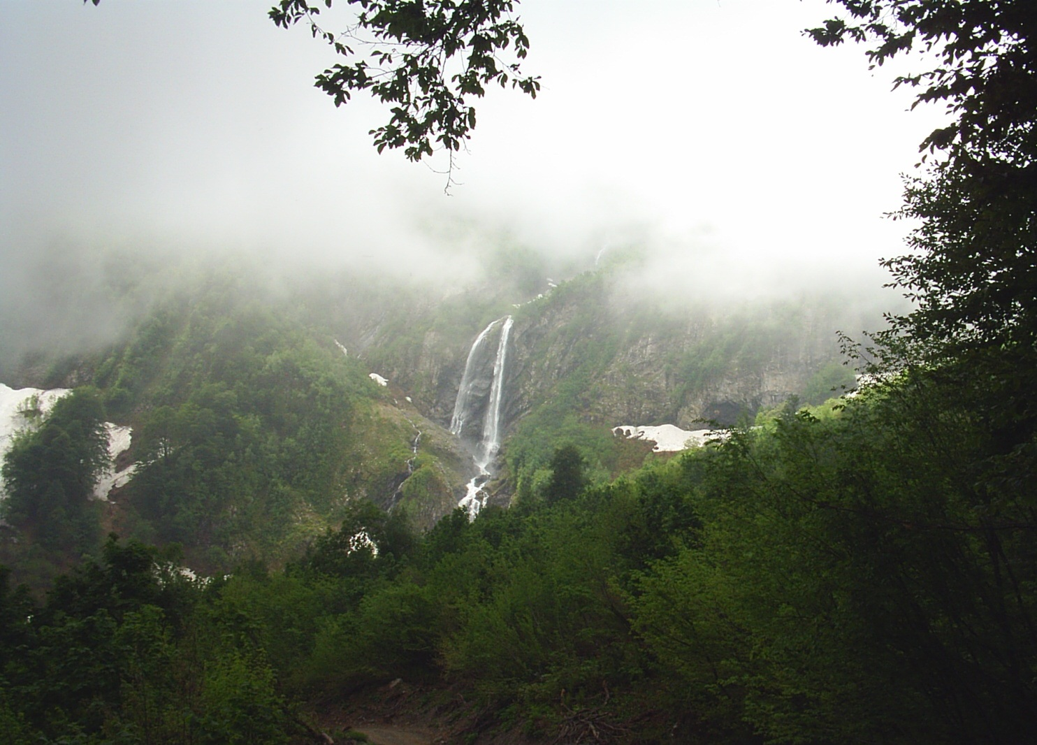 Водопад Поликаря в районе Красной Поляны, Сочи